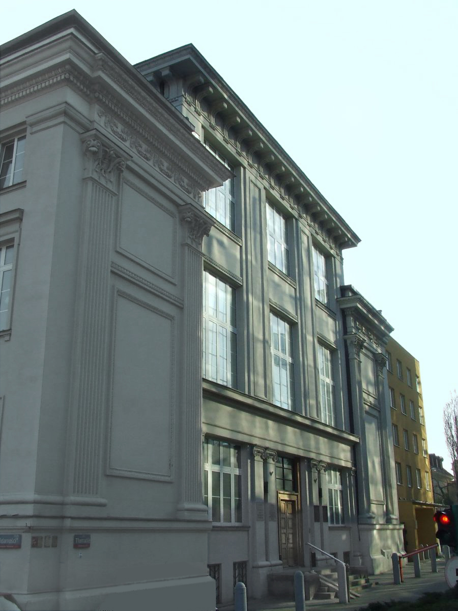 Żydowski Instytut Historyczny, ul. Tłomackie